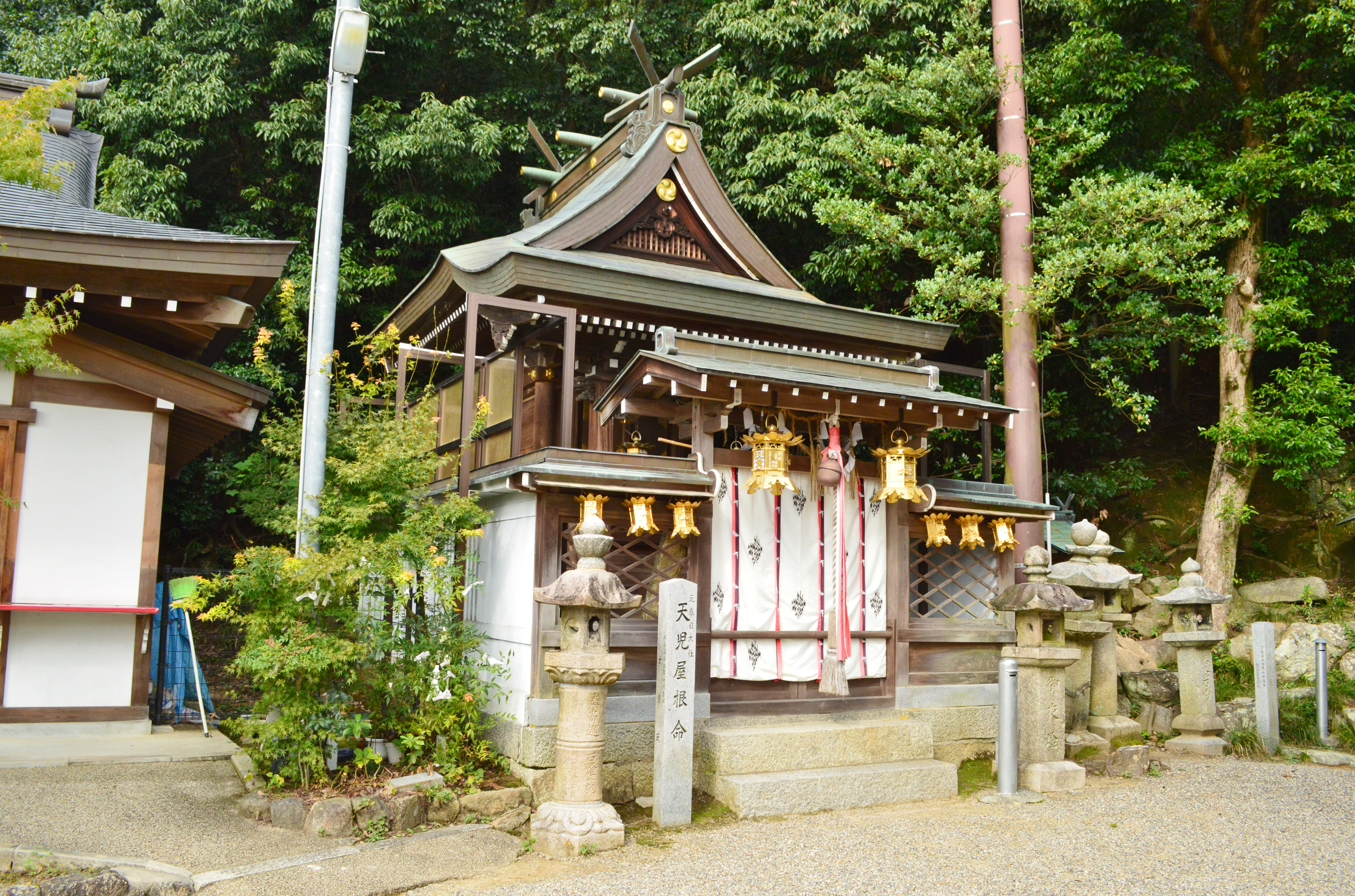 恩智神社 境内春日神社